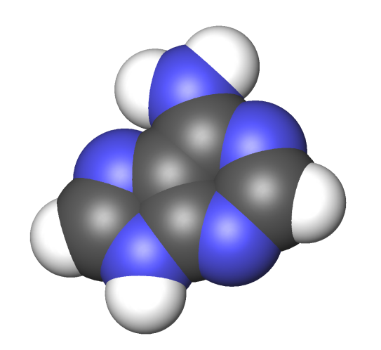 Adenine